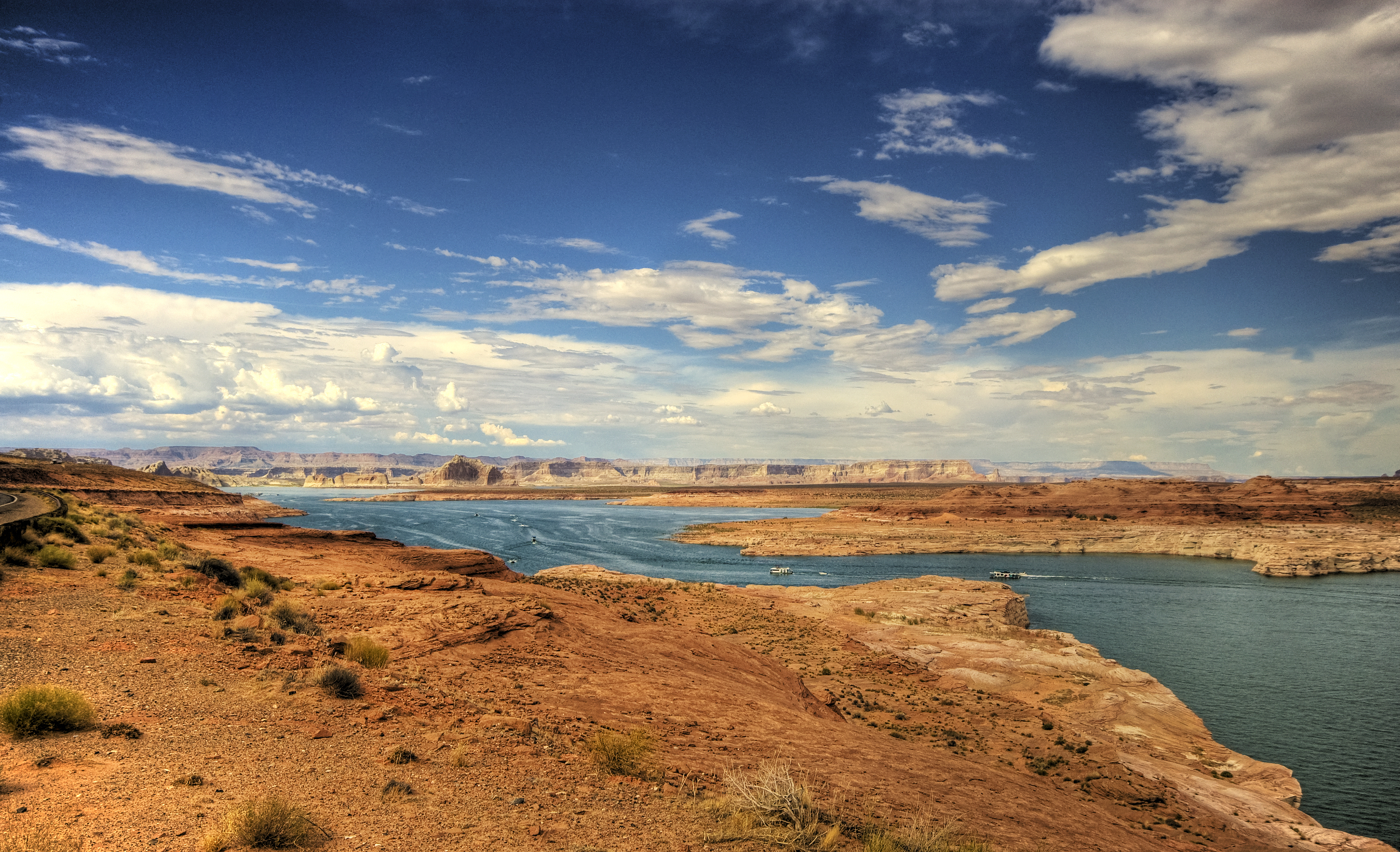 Lake Powell in Arizona